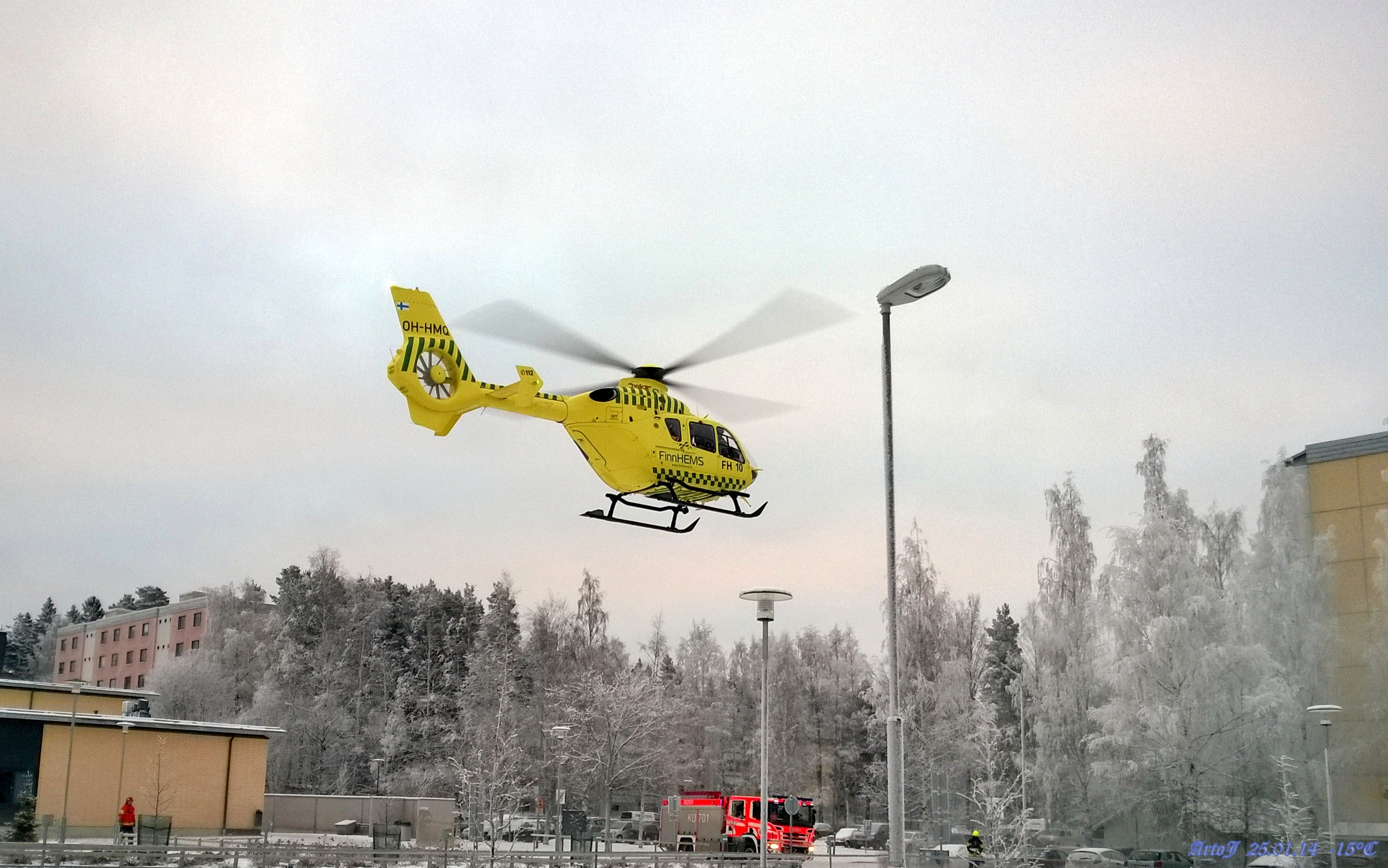 Järvenpää / FinnHEMS - Doctor Helicopter